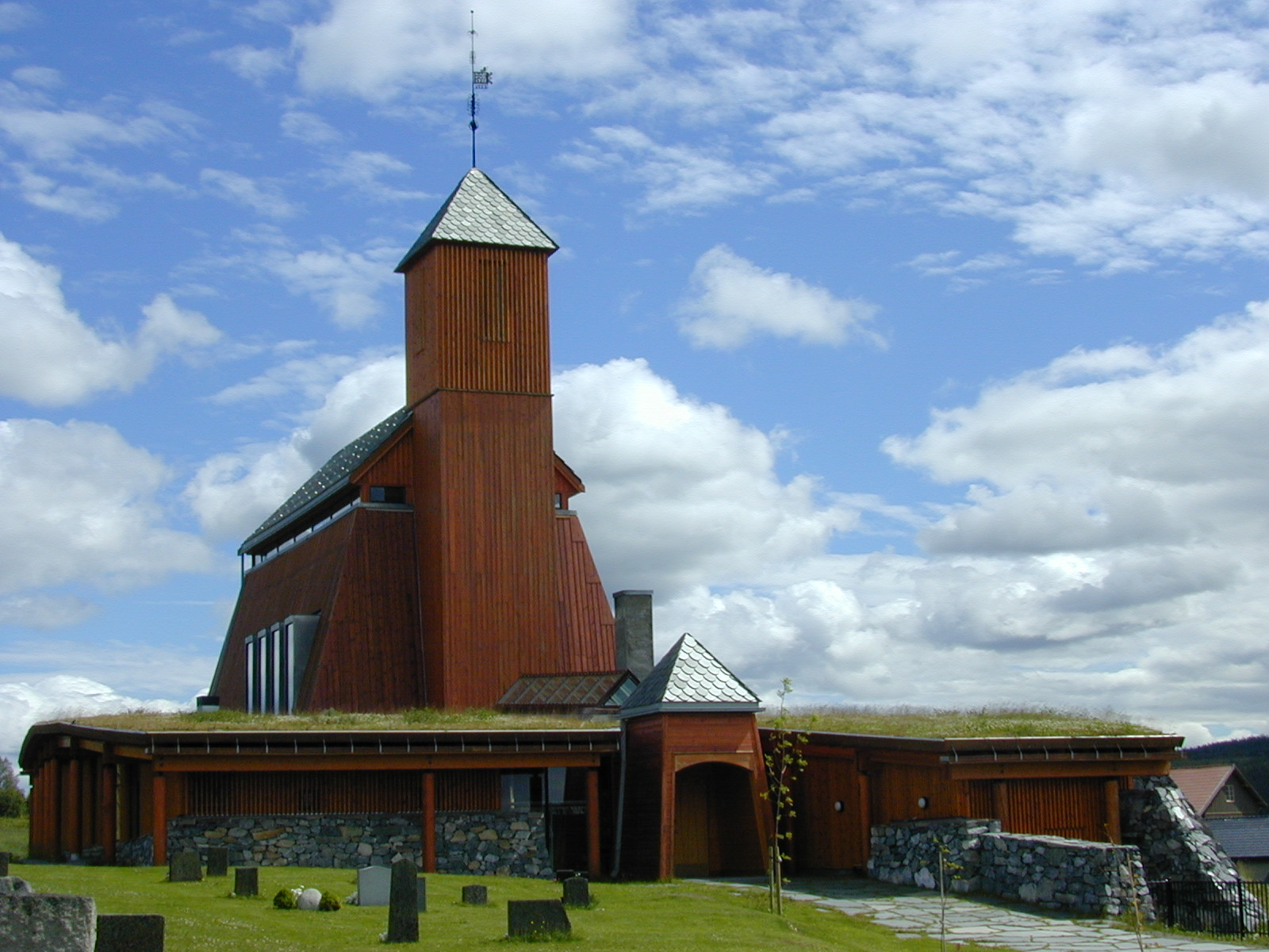 Seegård kirke, Snertingdal